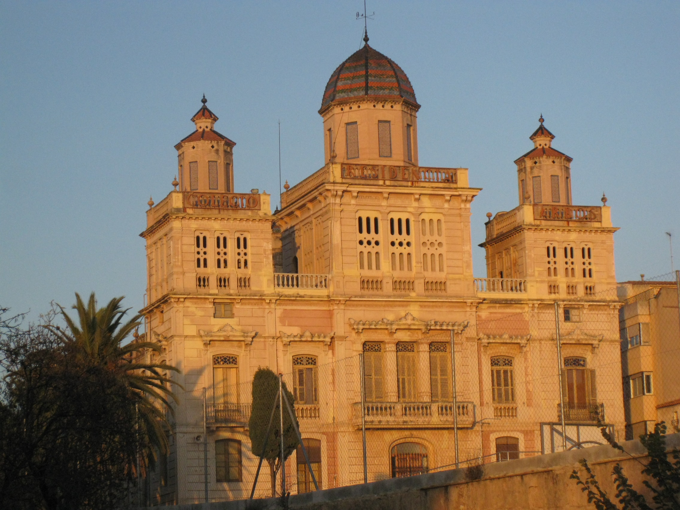 La Residència (l'Arboç)